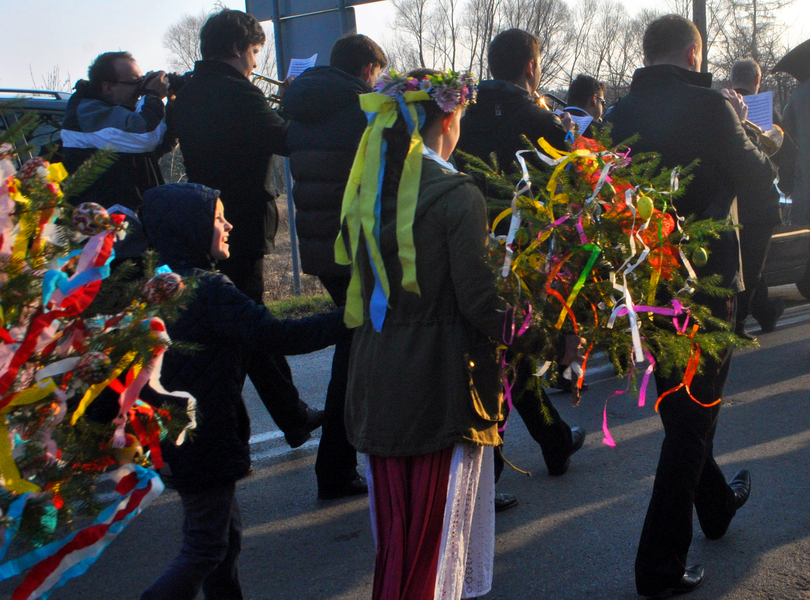 Uroczystość topienia Marzanny i wnoszenia gaika do Miasteczka Sląskiego, 21 marca 2015